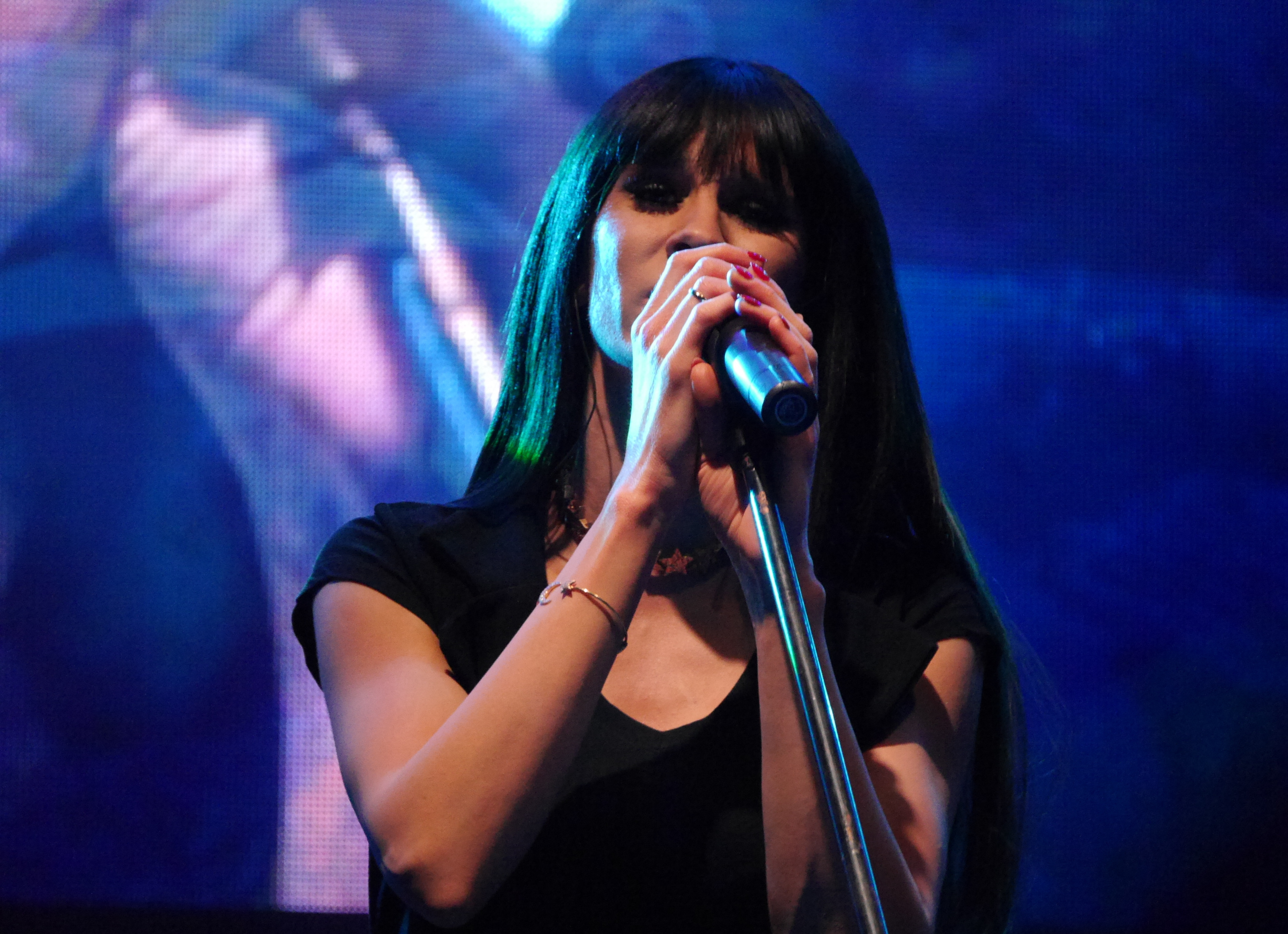 Sylwia Grzeszczak na koncercie we Wrocławiu w 12 listopada 2016 roku.